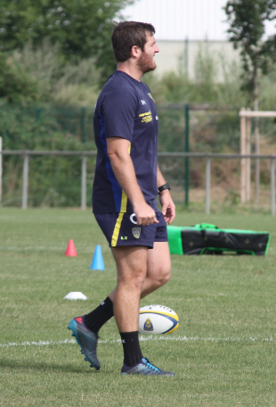 Asm Clermont